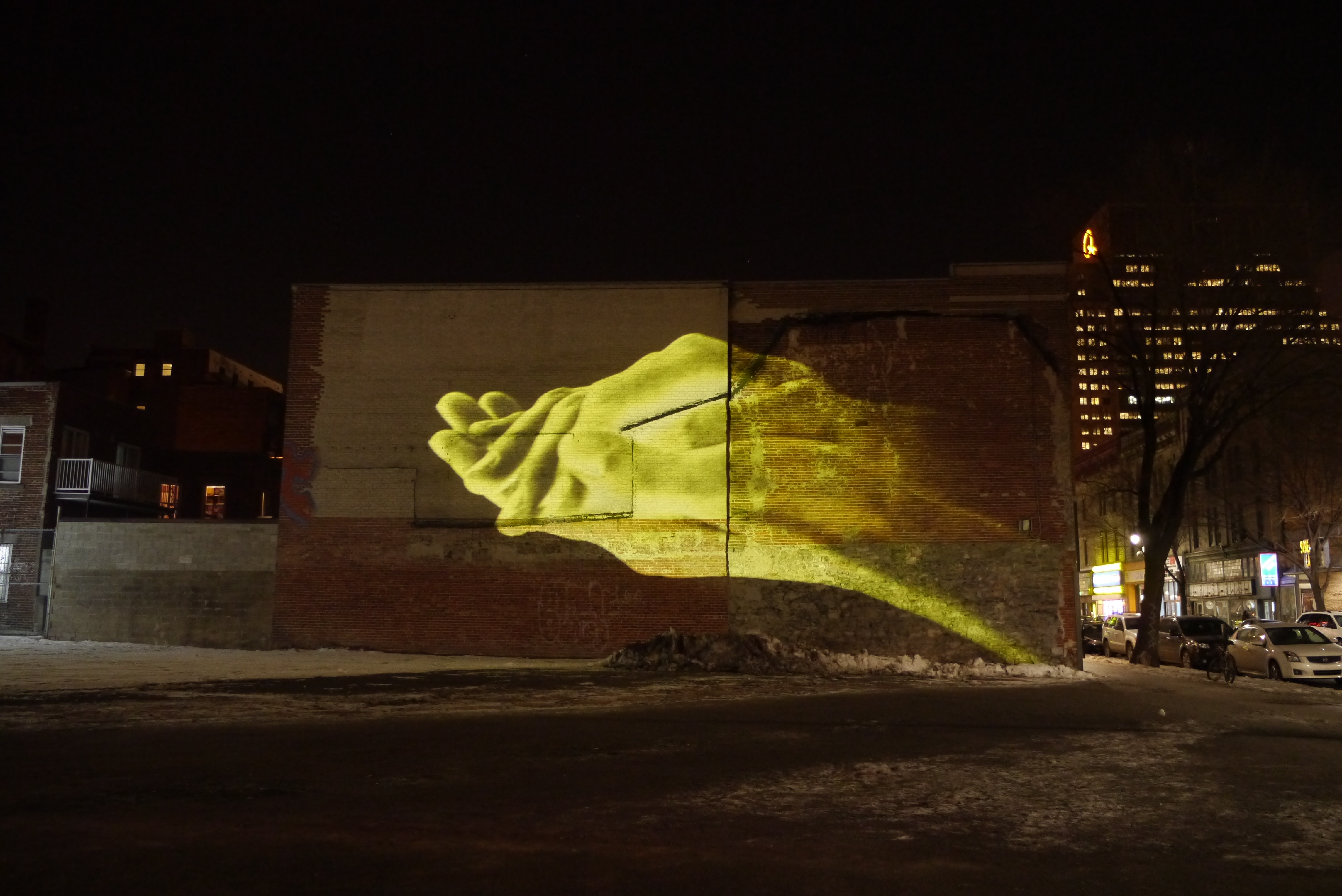 Station St-Laurent, Quartier des spectacles, Montréal JEUDI ET DIMANCHE DE 17H À 23H VENDREDI ET SAMEDI DE 17H À 2H Le jour des 8 soleils entraîne les visiteurs dans un parcours poétique à travers le Quartier, à la suite d’un personnage invisible en quête de cette lumière qui l’intrigue et le fascine. Attraction désormais emblématique du Quartier des spectacles, les vidéoprojections architecturales proposent pour la première fois une œuvre unique déclinée sur huit façades du Quartier. De plus, les spectateurs pourront, sur chaque site de projection, enrichir leur expérience visuelle en écoutant la trame sonore et narrative diffusée sur leur téléphone cellulaire.